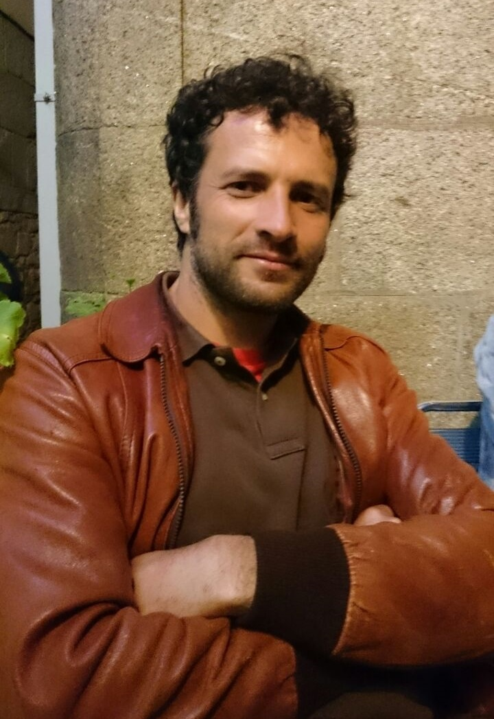 Camilo Rodríguez Vidal, "Camilo Seira", escultor e muralista galego